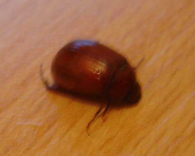 Maladera matrida